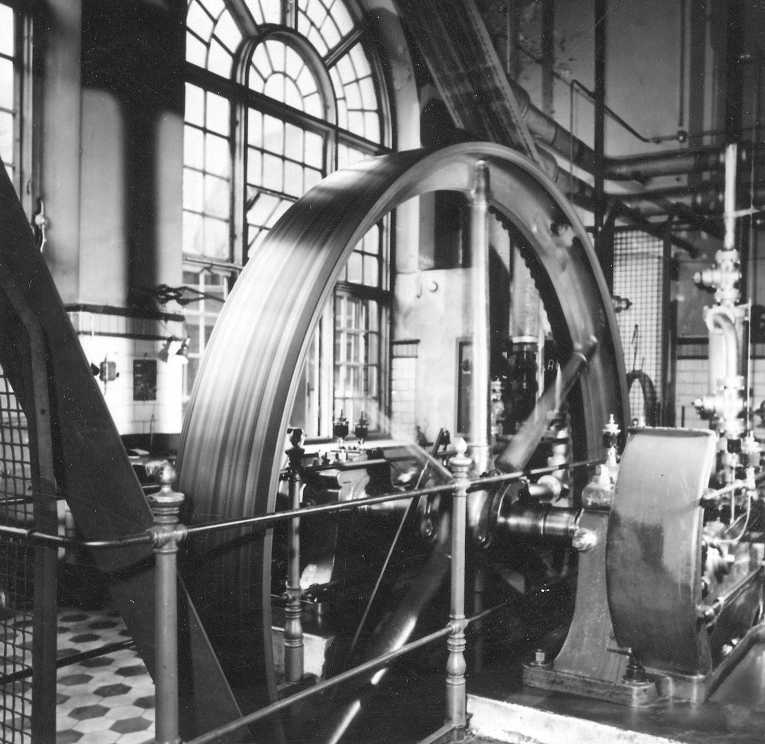 Dykärret Mindre 12, f.d. Nürnbergs bryggeri, maskinhall, kylhuset